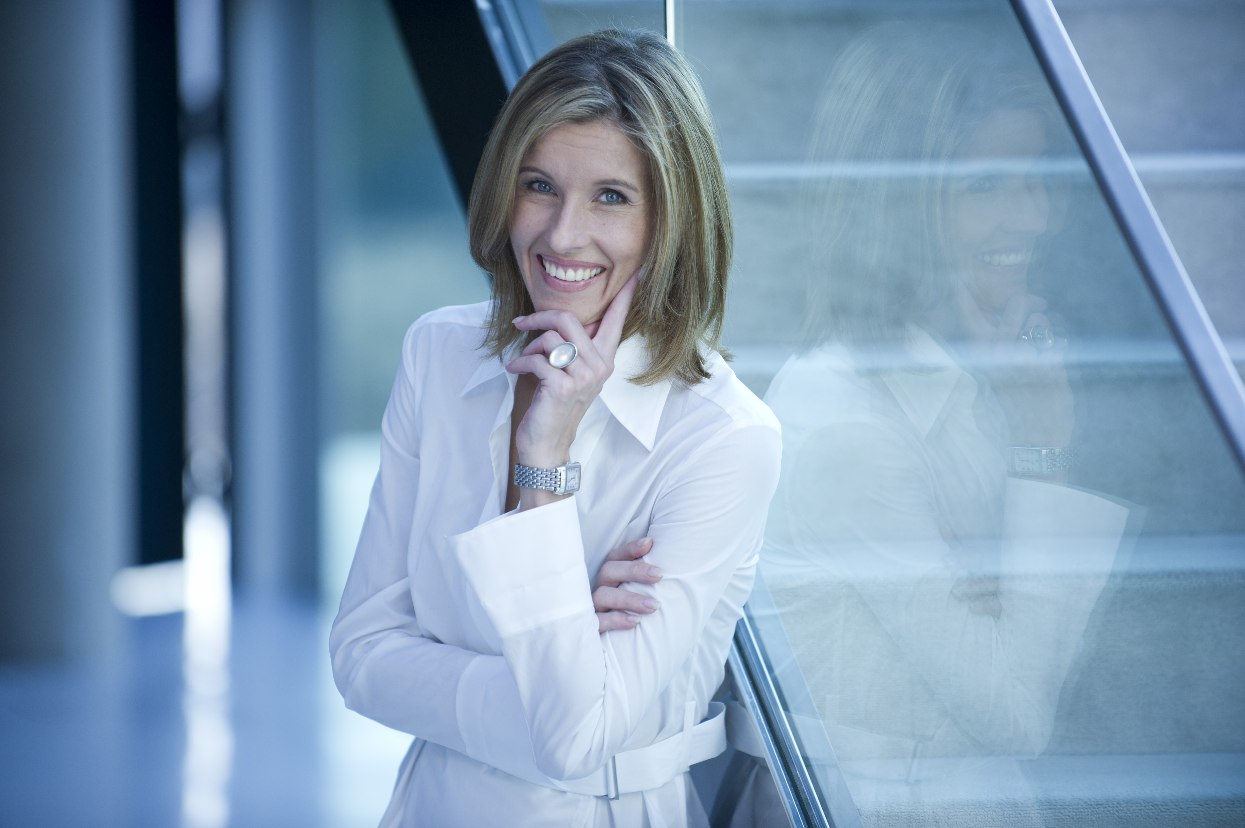 Portraitfoto von Monika Matschnig